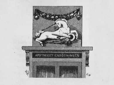 Apoteket Enhörningens gamla skylt.